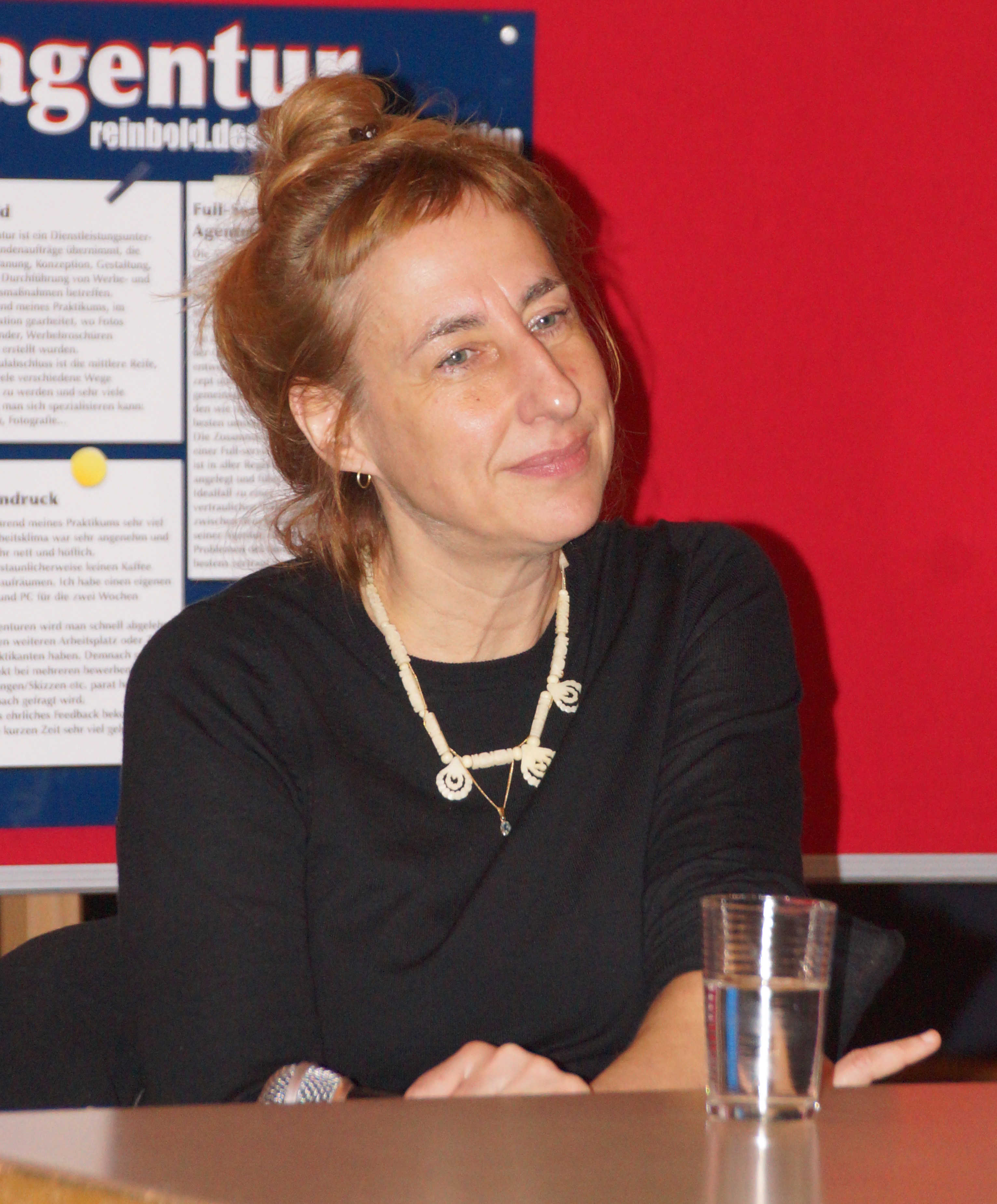 Judith Hermann, Lesung